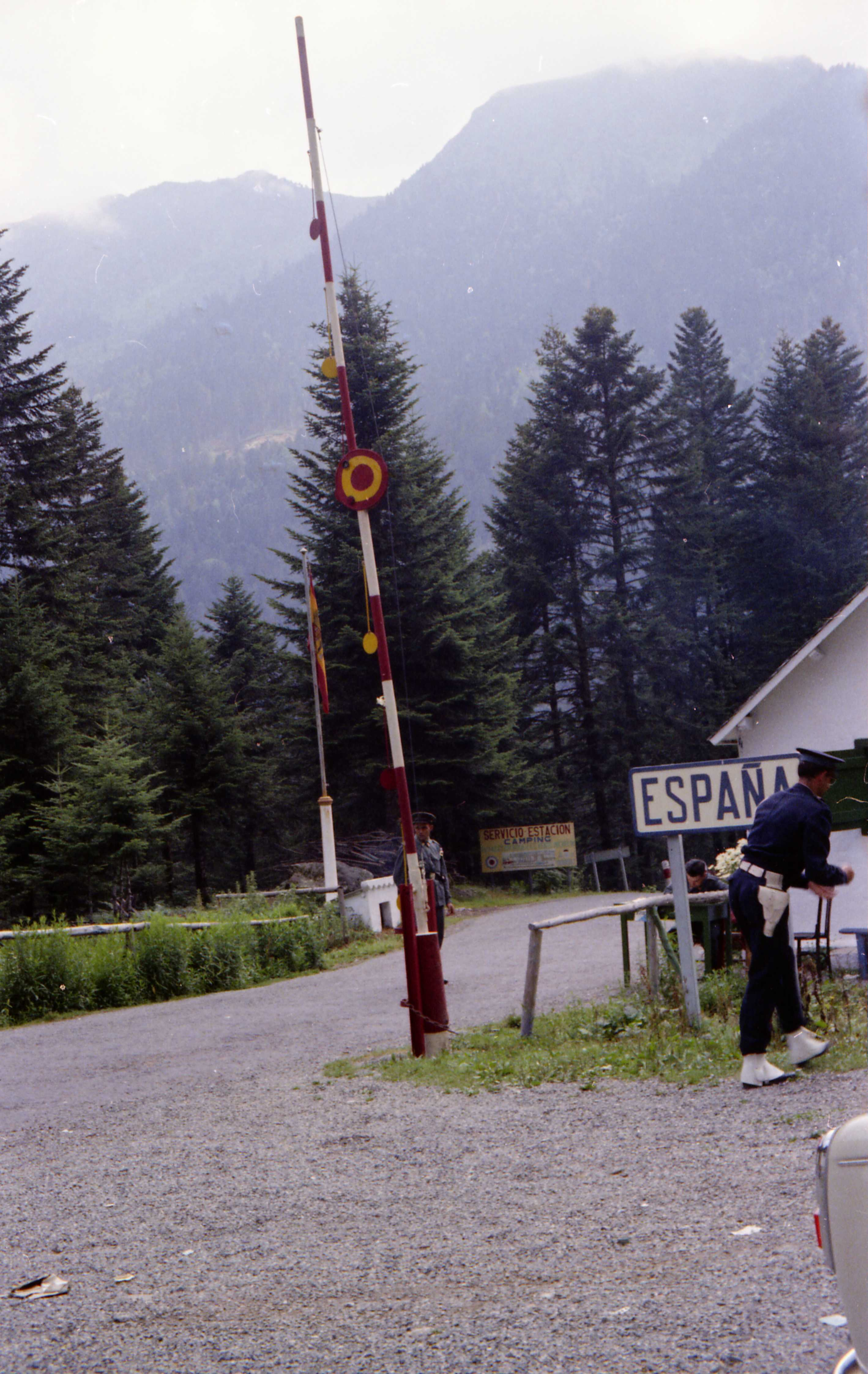 La poste-frontière espagnol au col du Portillon près de Bagnères-de-Luchon dans les Pyrénées, en direction a Bossòst. Août 1965.